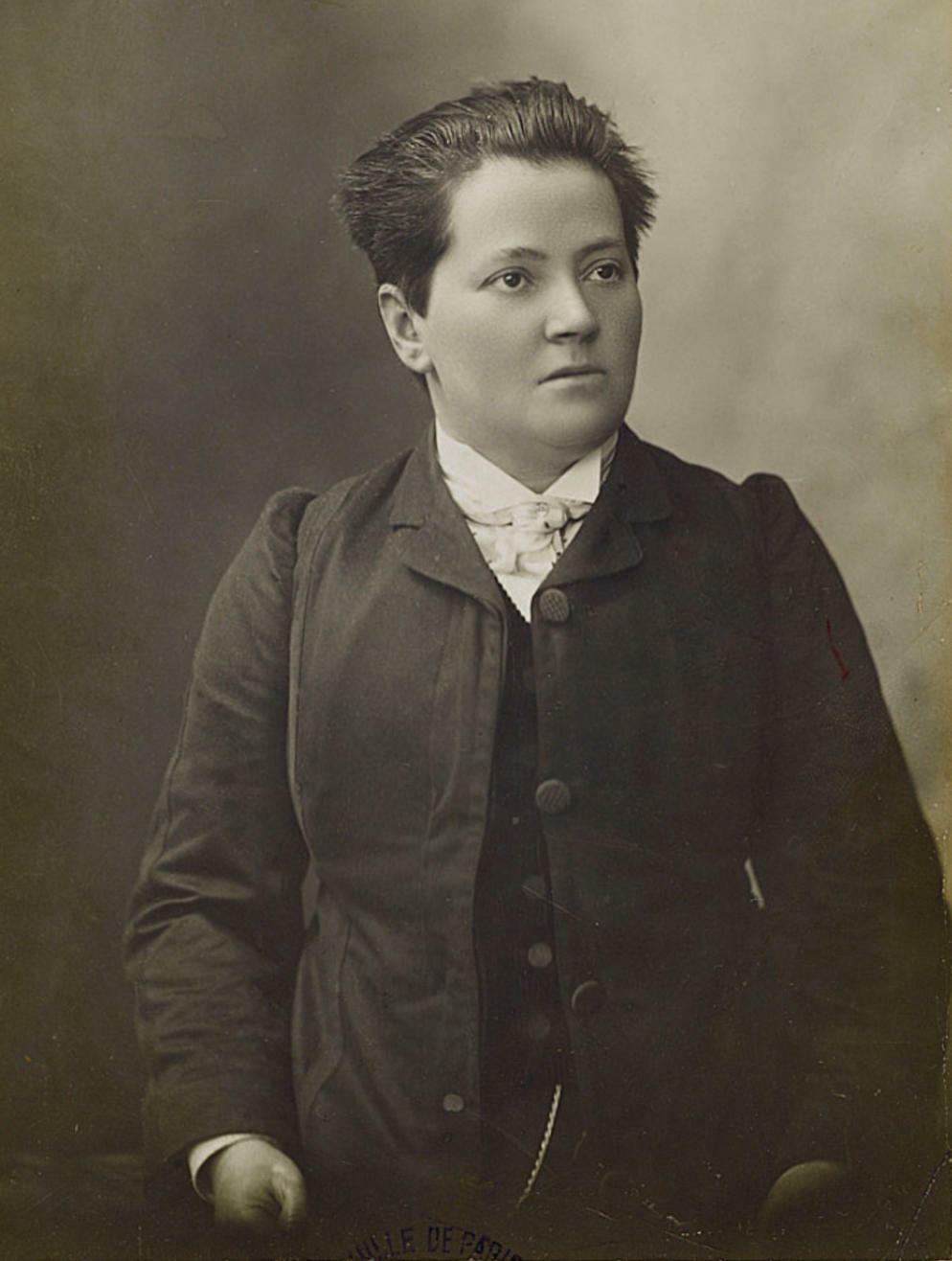 Madeleine Pelletier (1874-1939), feministe et anarchiste